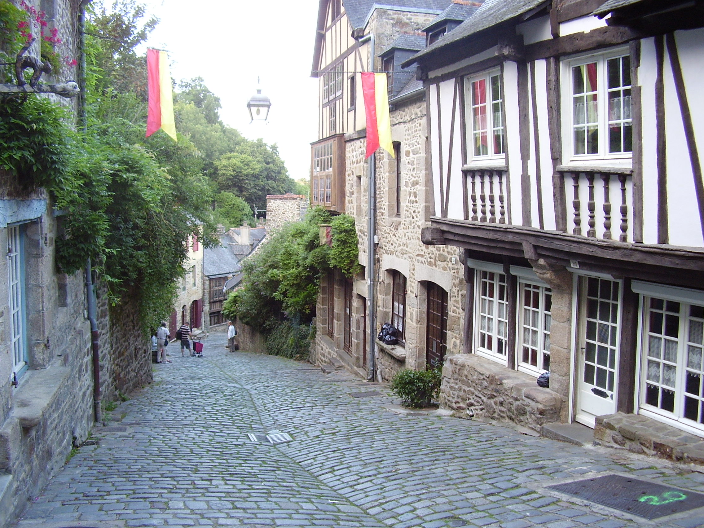 Maisons, 30 et 32 rue du Jerzual à Dianan, Bretagne; Frankreich